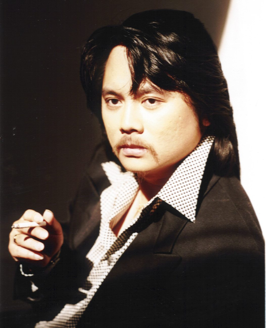 Hồ sơ hình này là hình của chính tôi (nhạc sĩ Hoàng Thanh Tâm), chụp bởi nghệ sĩ Thái Tài vào năm 1993, khi tôi sang Mỹ để thực hiện album CD tình ca Hoàng Thanh Tâm 4 và 5 do trung tâm Giáng Ngọc và Làng Văn phát hành.